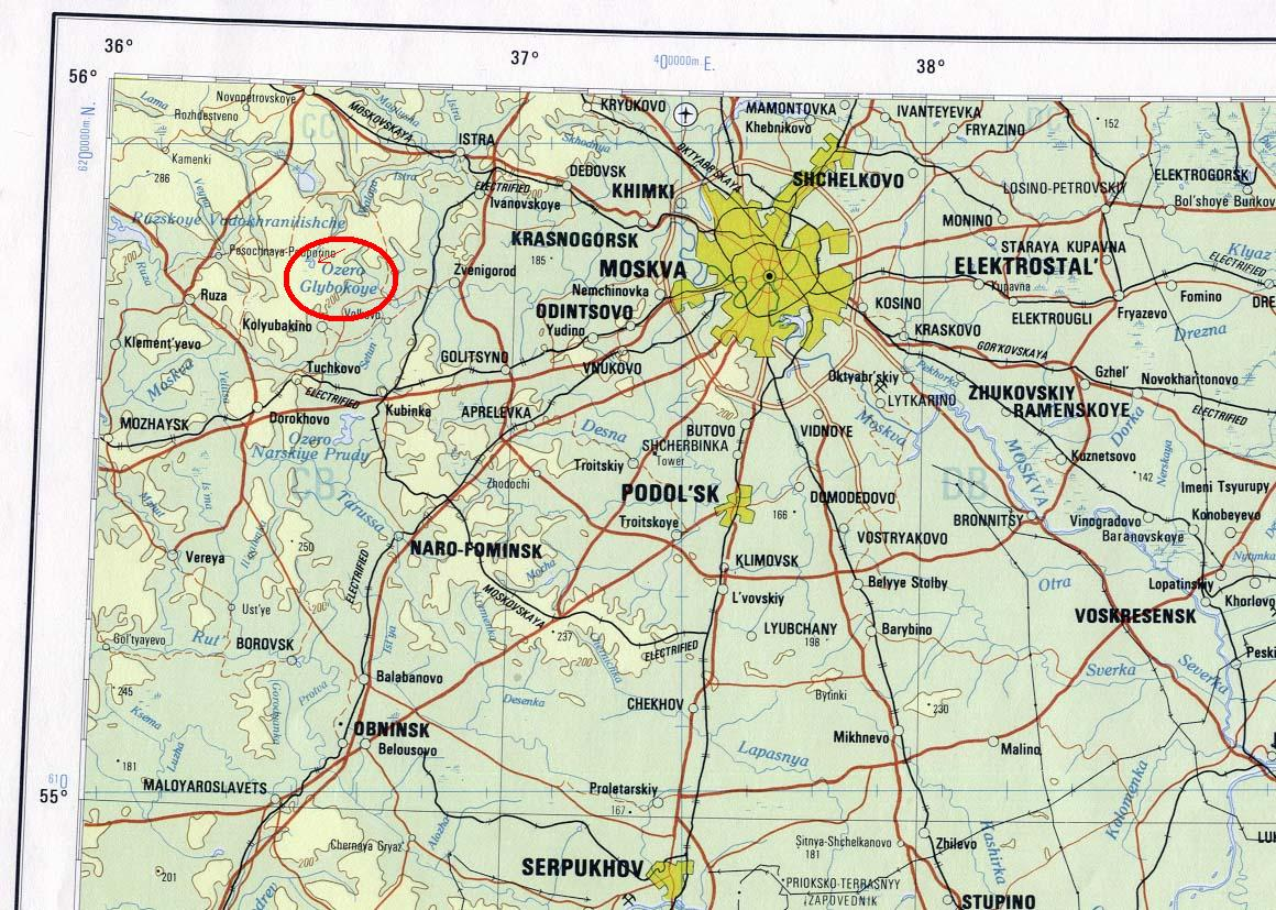 Положение Глубокого озера в Московской области.